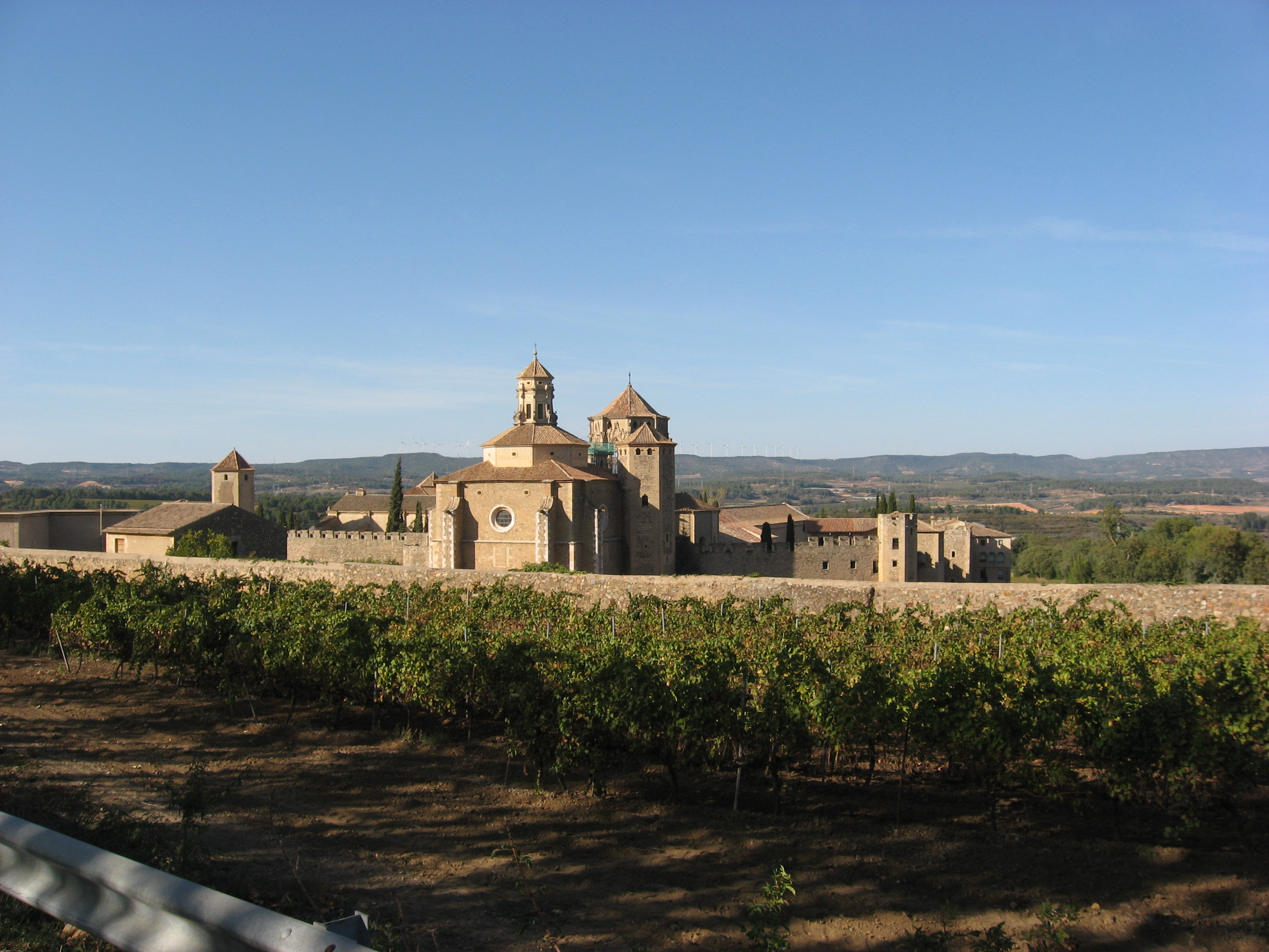 Reial Monestir de Santa Maria de Poblet (Vimbodí i Poblet)